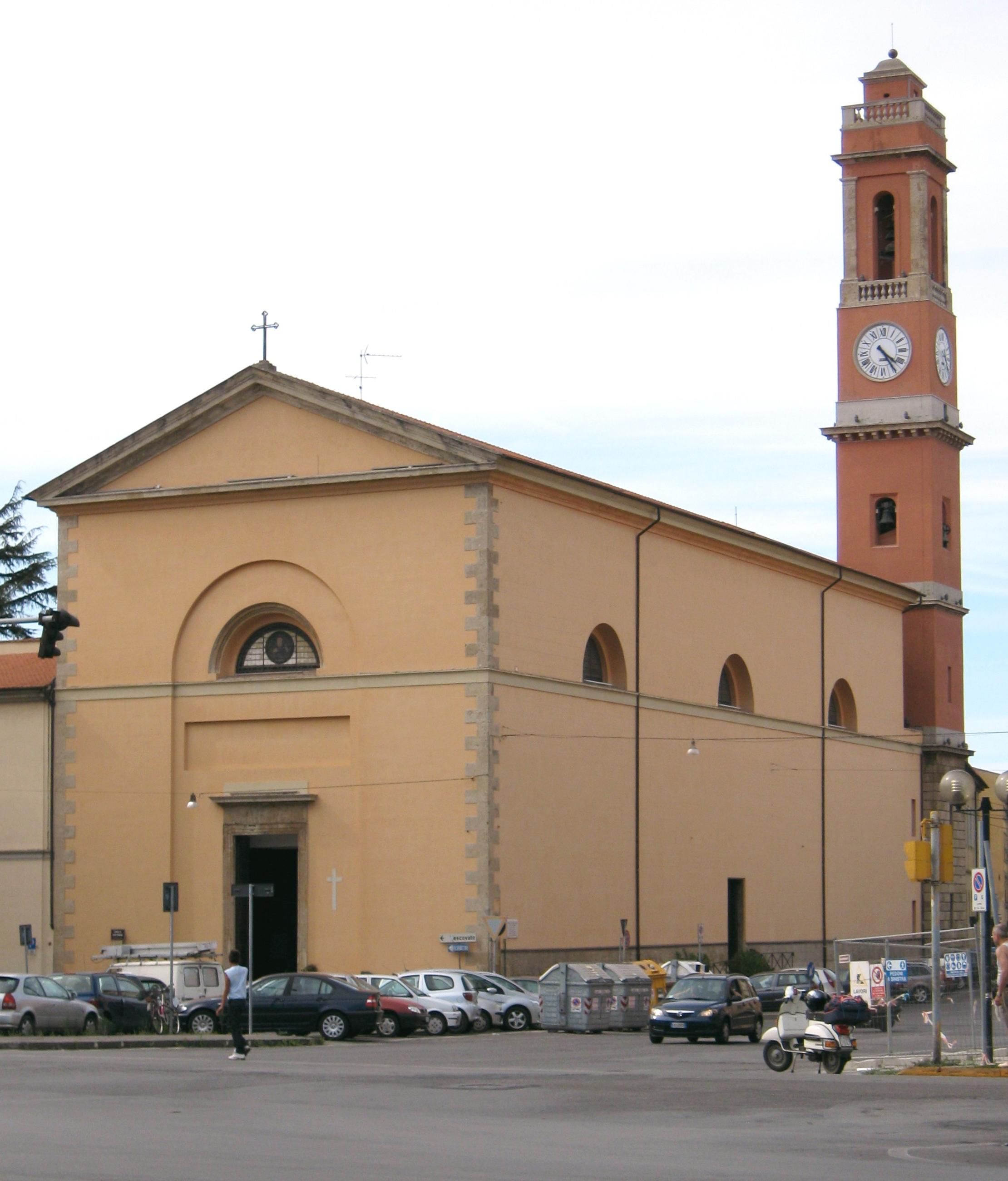 Livorno: la chiesa di Sant'Andrea (XIX secolo).